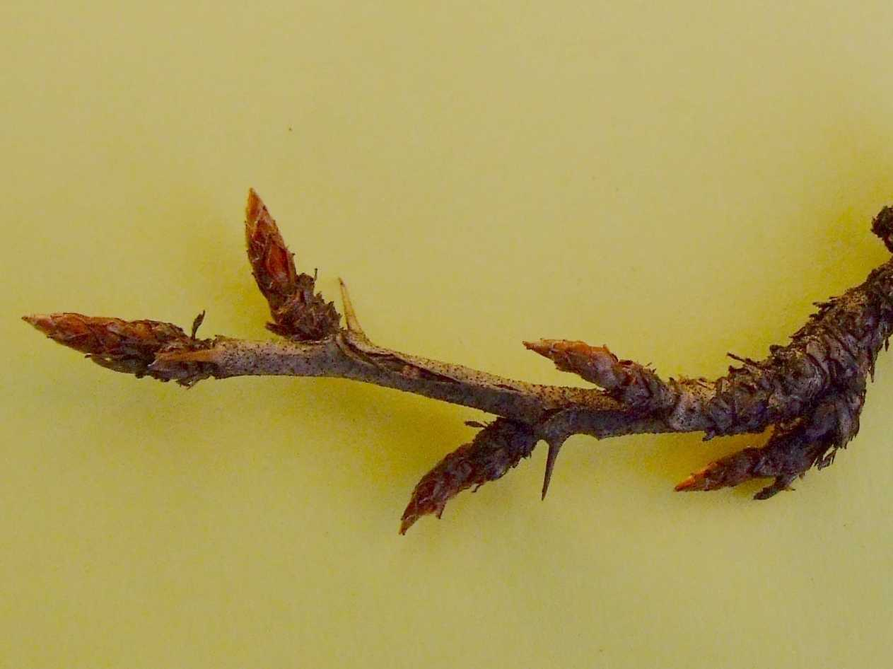 Ribes grossularia